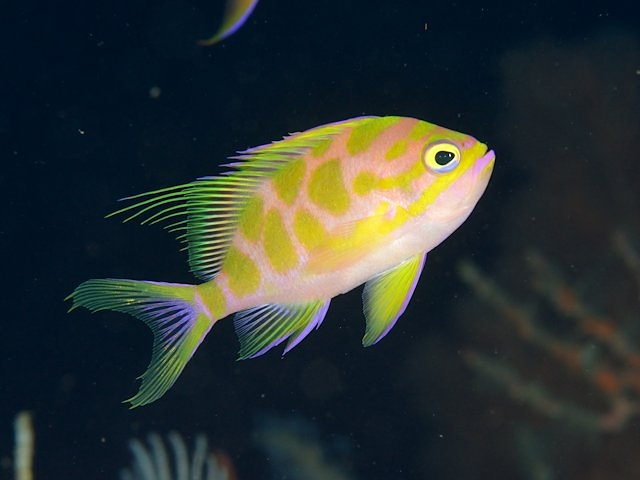 マダラハナダイ Odontanthias borbonius